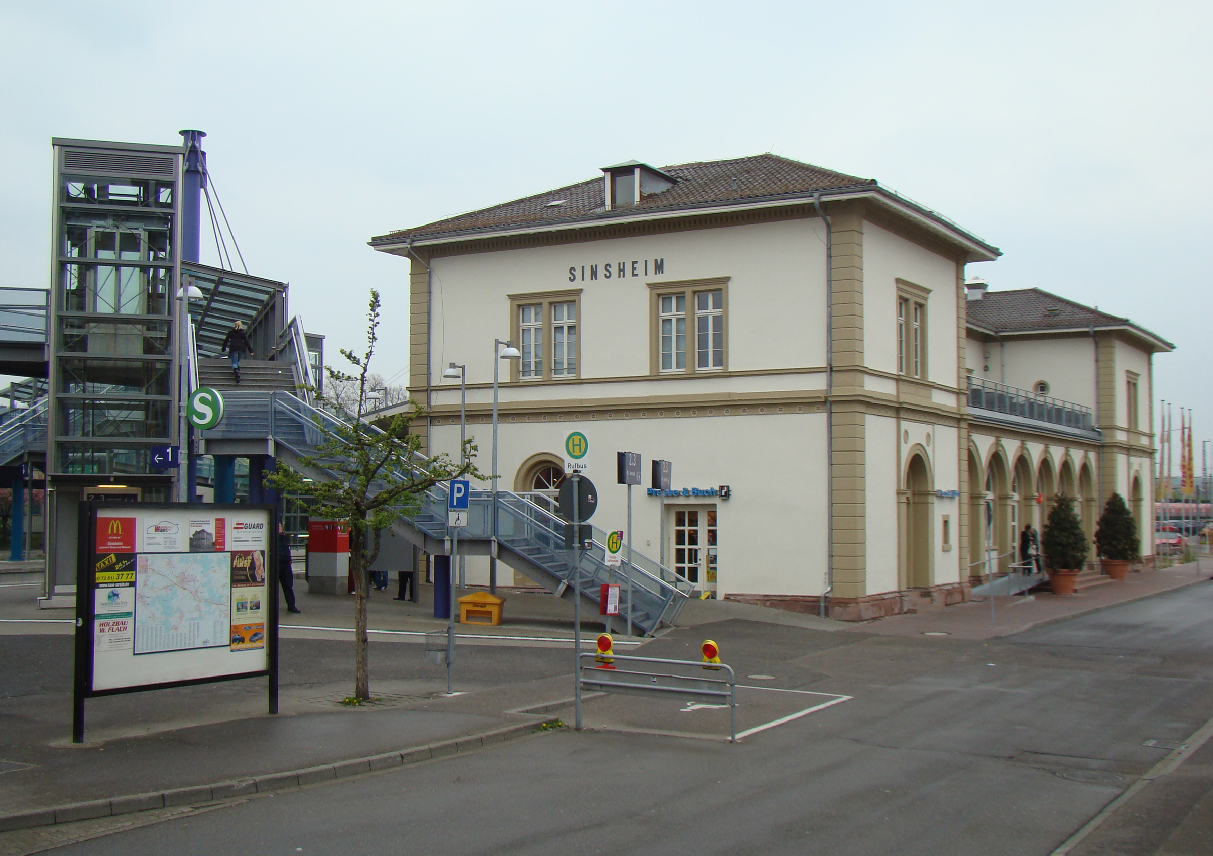 Sinsheim Hauptbahnhof